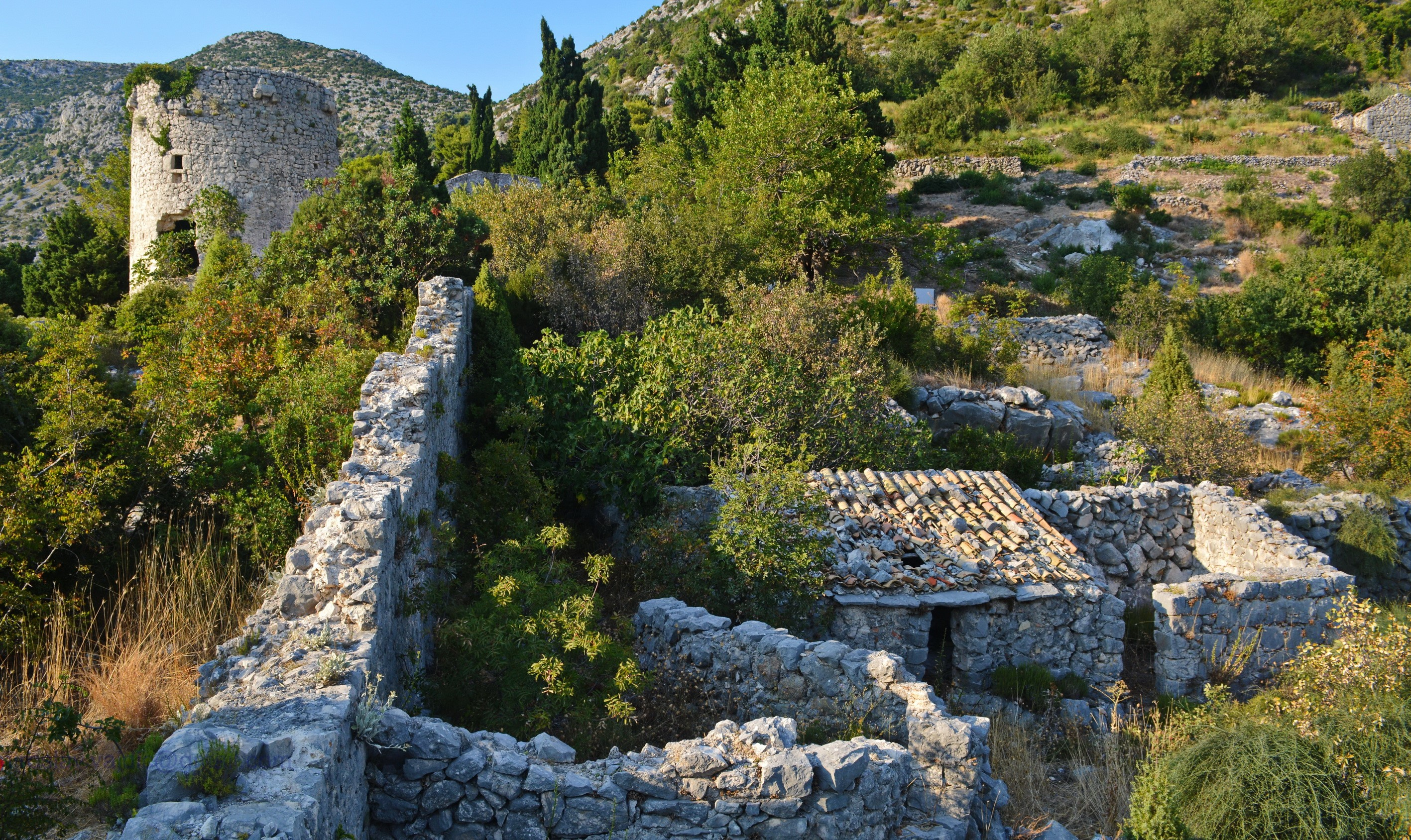 Smrdan grad